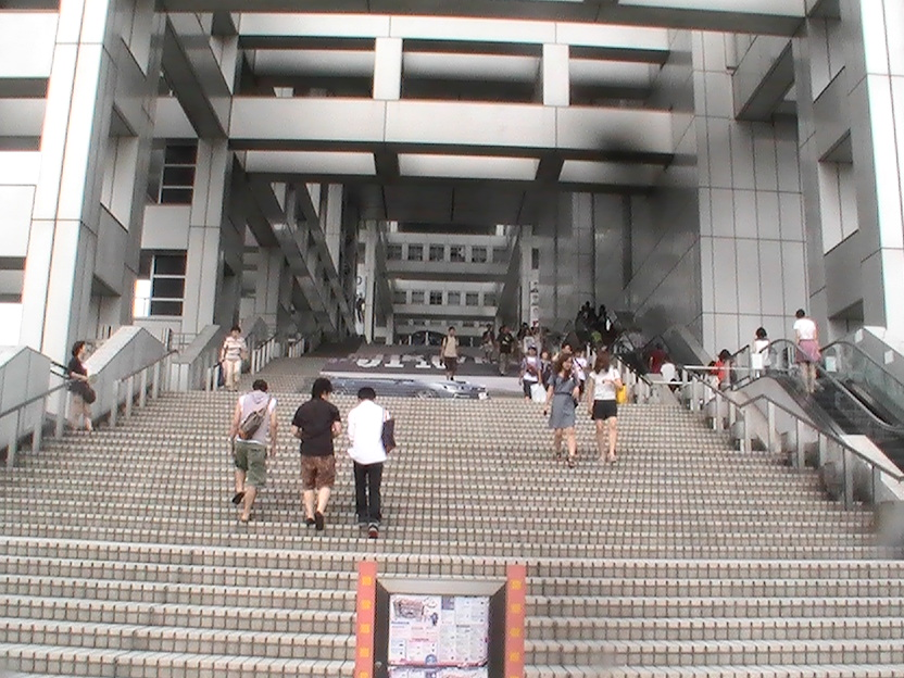 フジテレビ本社屋の7階屋上庭園に上る大階段（2014年）